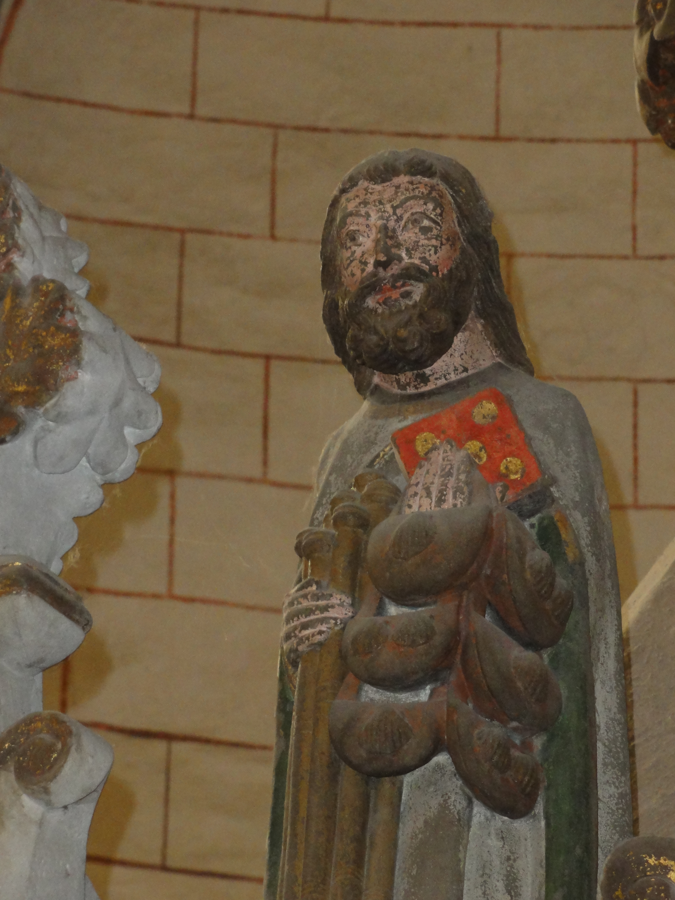 Konstanz — Münster, Mauritiusrotunde GPS data may be inaccurate. EXIF data regarding date and time may be inaccurate.